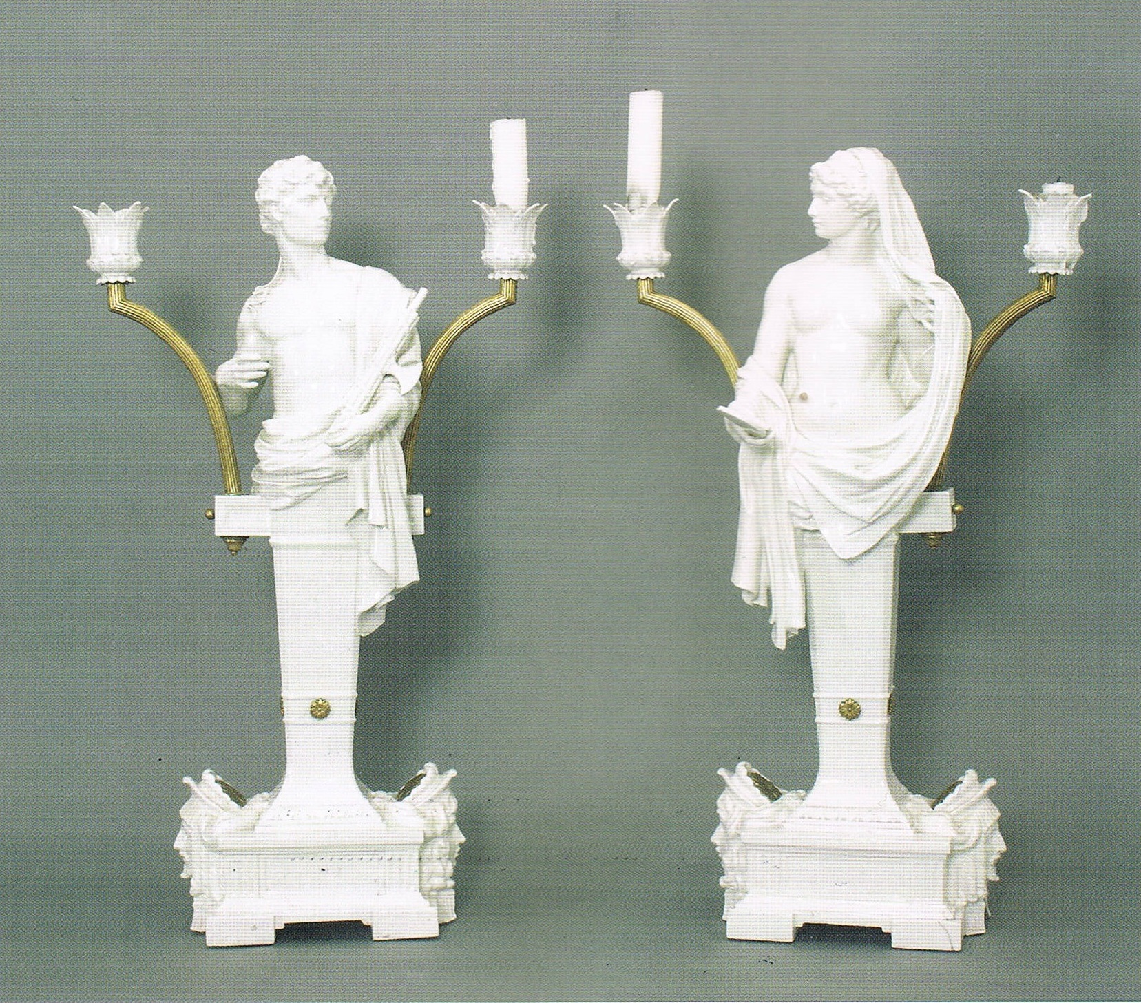 KPM-Kerzenleuchter nach Modellen von Hans Latt published before 1940.